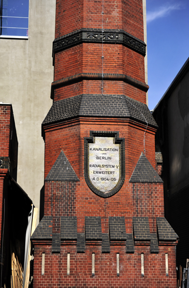 Berliner Abwasserentsorgung, ehemaliges Pumpwerk - Radialsystem V an der Spree, Holzmarktstrasse 33